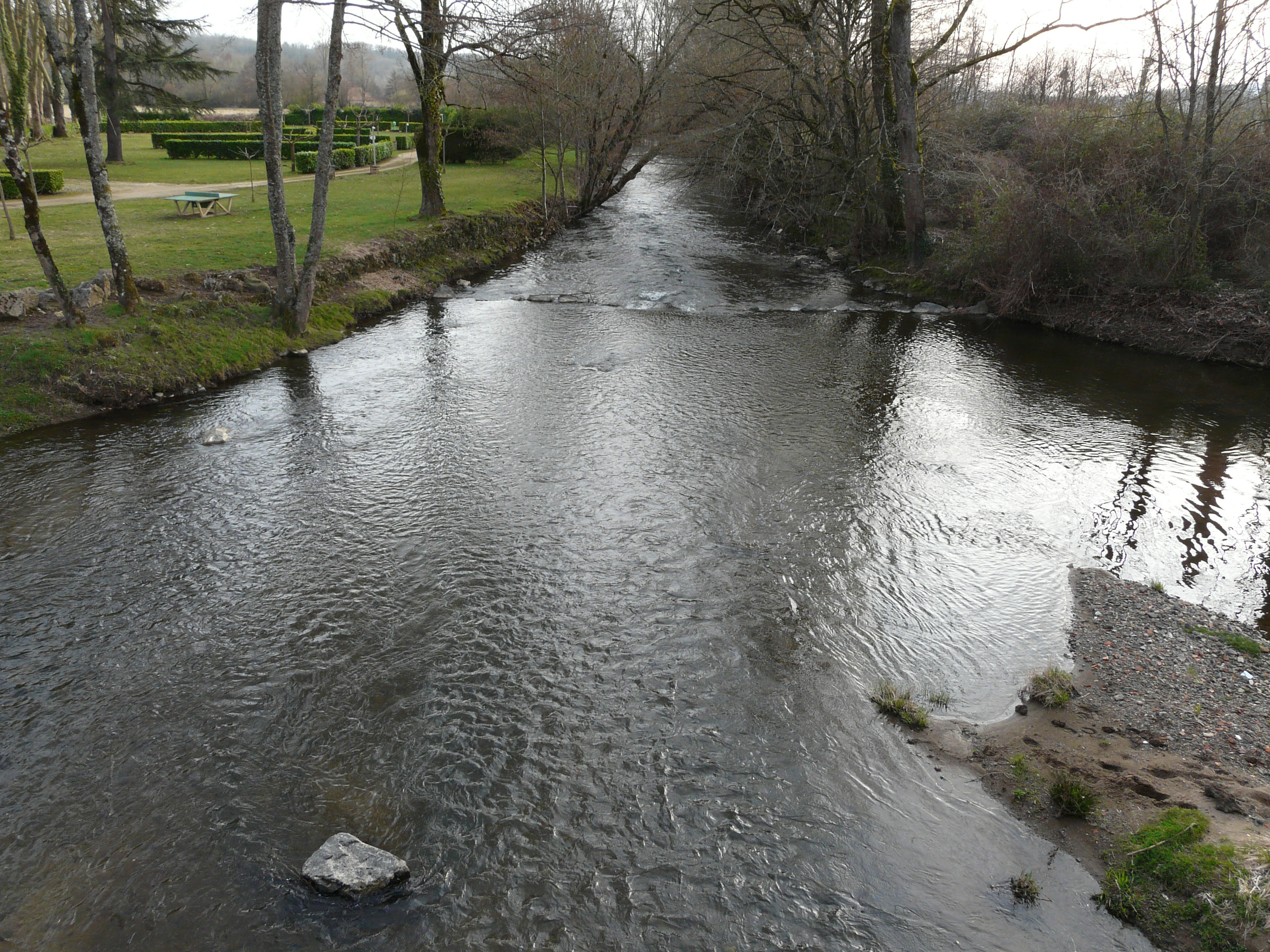 La Loue au pont de la RD 705, Excideuil, Dordogne, France